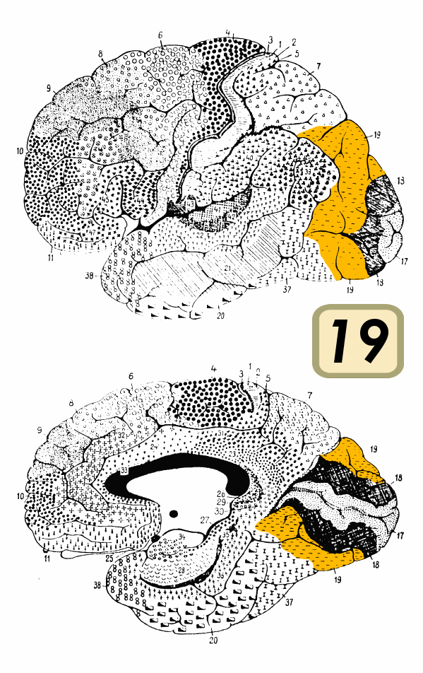 Brodmann area 19.